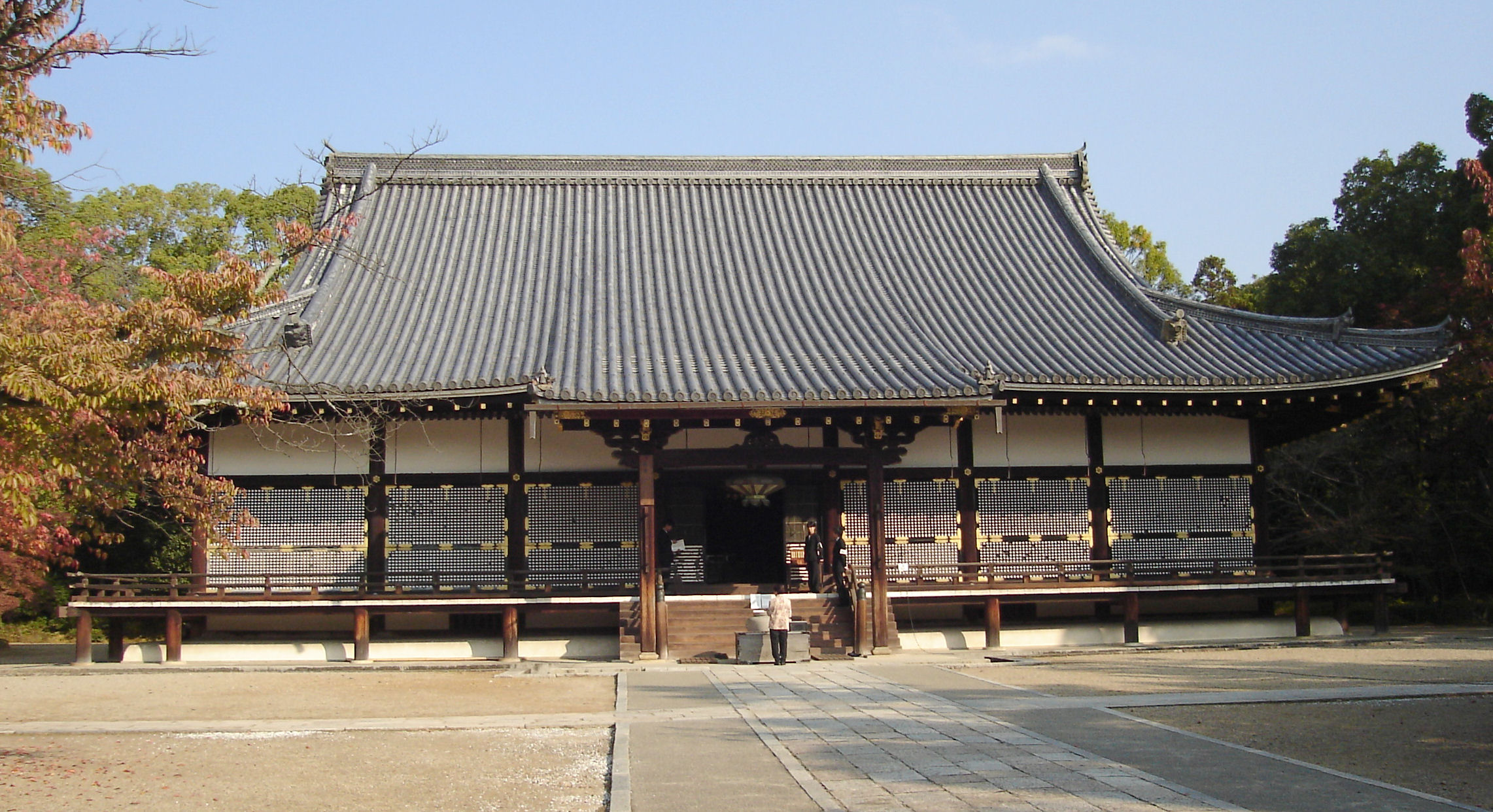 Ninnaji Kondo